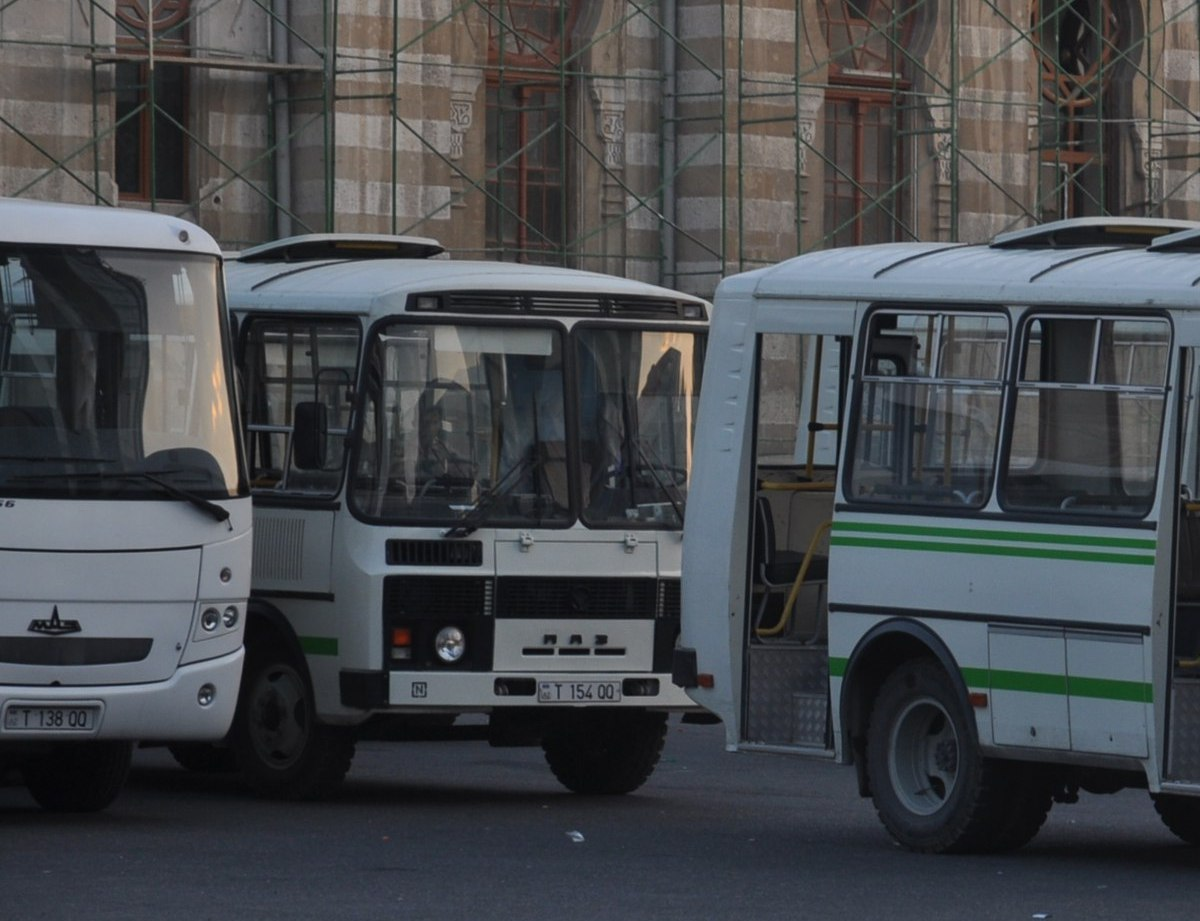 Военные номера Азербайджана с 2014 года